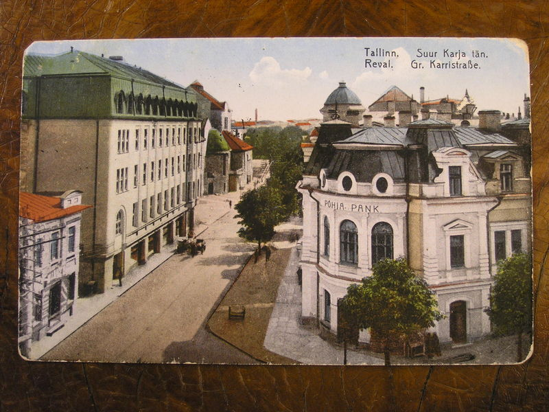 Tallinna kesklinna Suur-Karja tänava hoone 20 piltpostkaardil